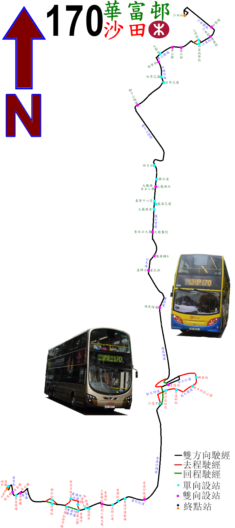 中文（香港）: 過海隧巴170線的走線圖